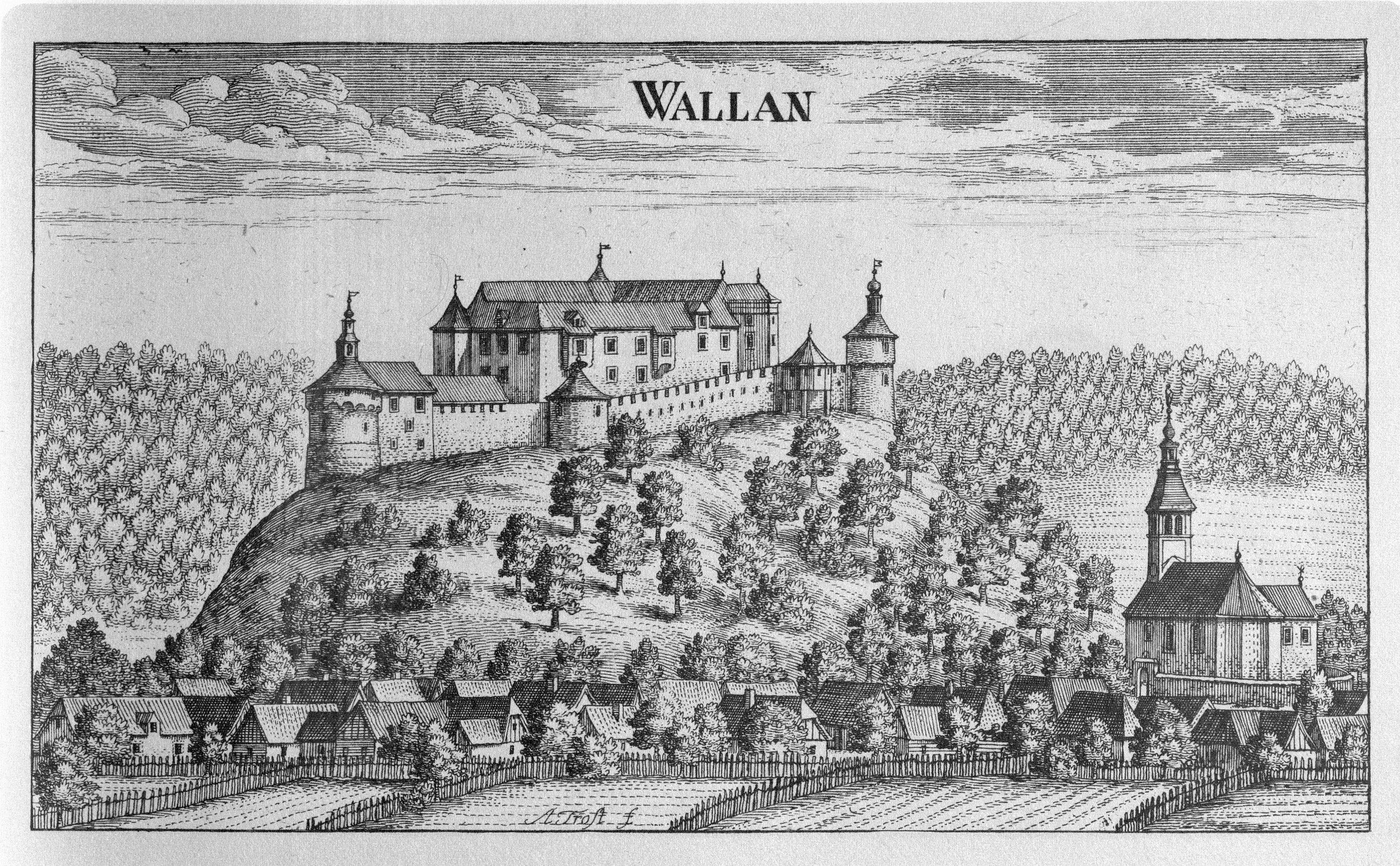 G. M. Vischers Käyserlichen Geographi, Topographia Ducatus Stiriae, Das ist: Eigentliche Delineation / und Abbildung aller Städte / Schlösser / Marcktfleck / Lustgärten / Probsteyen / Stiffter / Clöster und Kirchen / so es sich im Herzogthumb Steyrmarck befinden; Und anjetzo Umb einen billichen Preyß zu finden seynd Bey Johann Bitsch Universitäts Buchhandlern / Auff dem Juden=Platz bey der guldenen Saulen. Graz 1681 Die Nummerierung der Dateien folgt der alphabetischen Reihung der Ortsnamen und entspricht nicht dem Vischer-Register